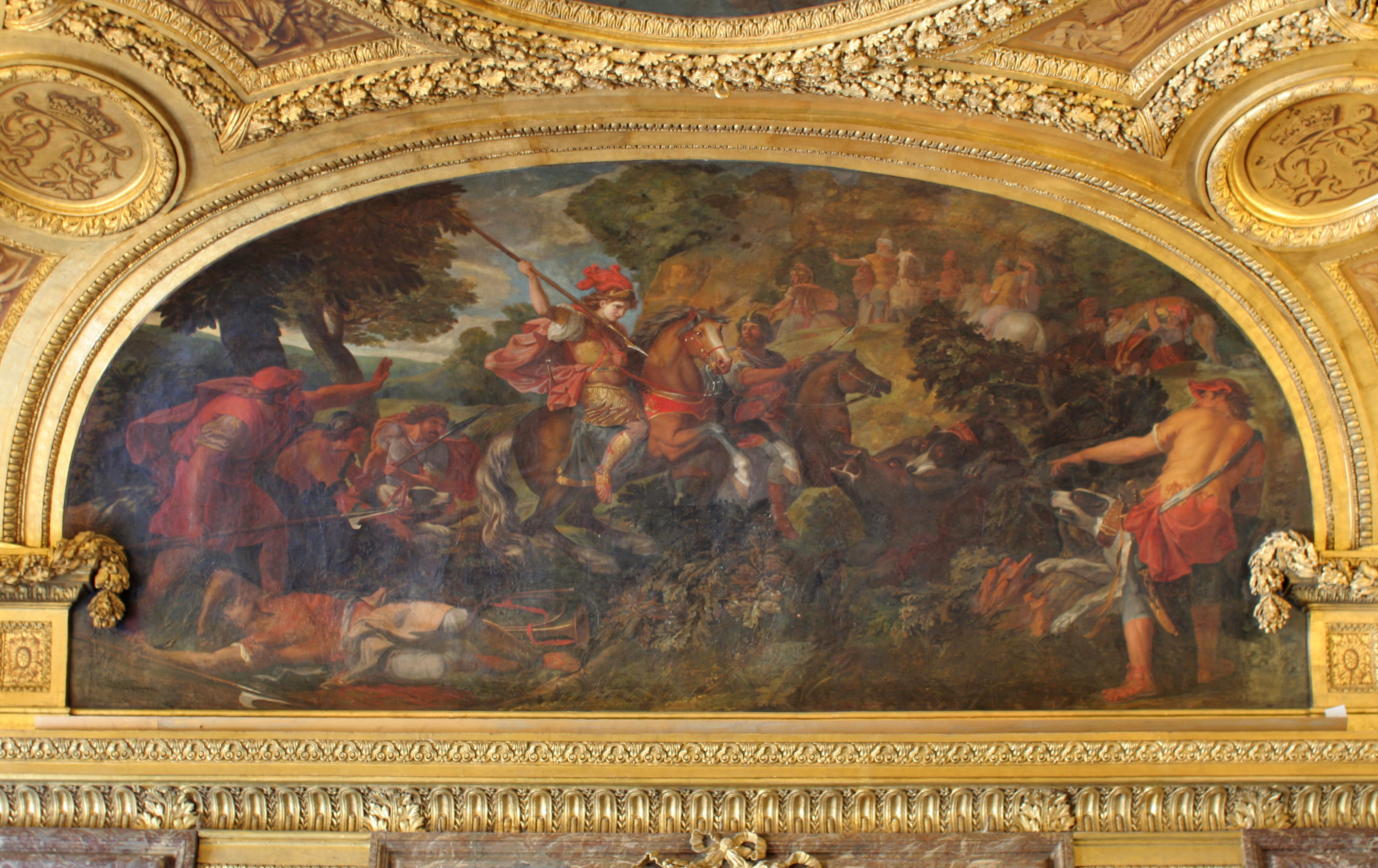 Château de Versailles, salon de Diane, voussure : Cyrus chassant le sanglier, Claude Audran II.